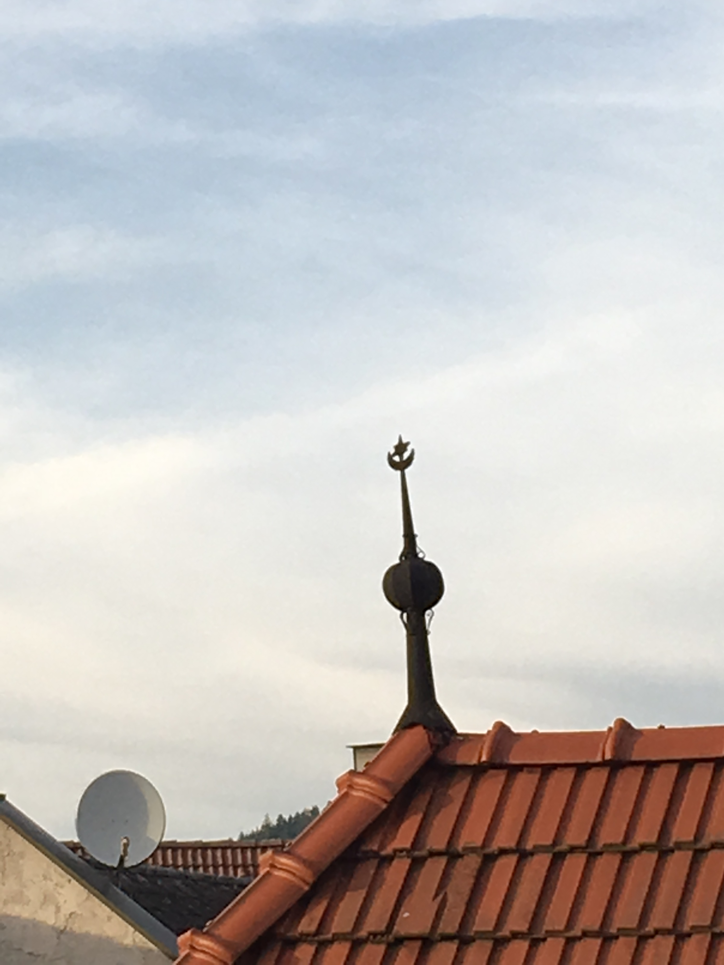 Dachverzierung, die dem Sieg über die Osmanen der Türkenbelagerung von Scheibbs gewidmet ist